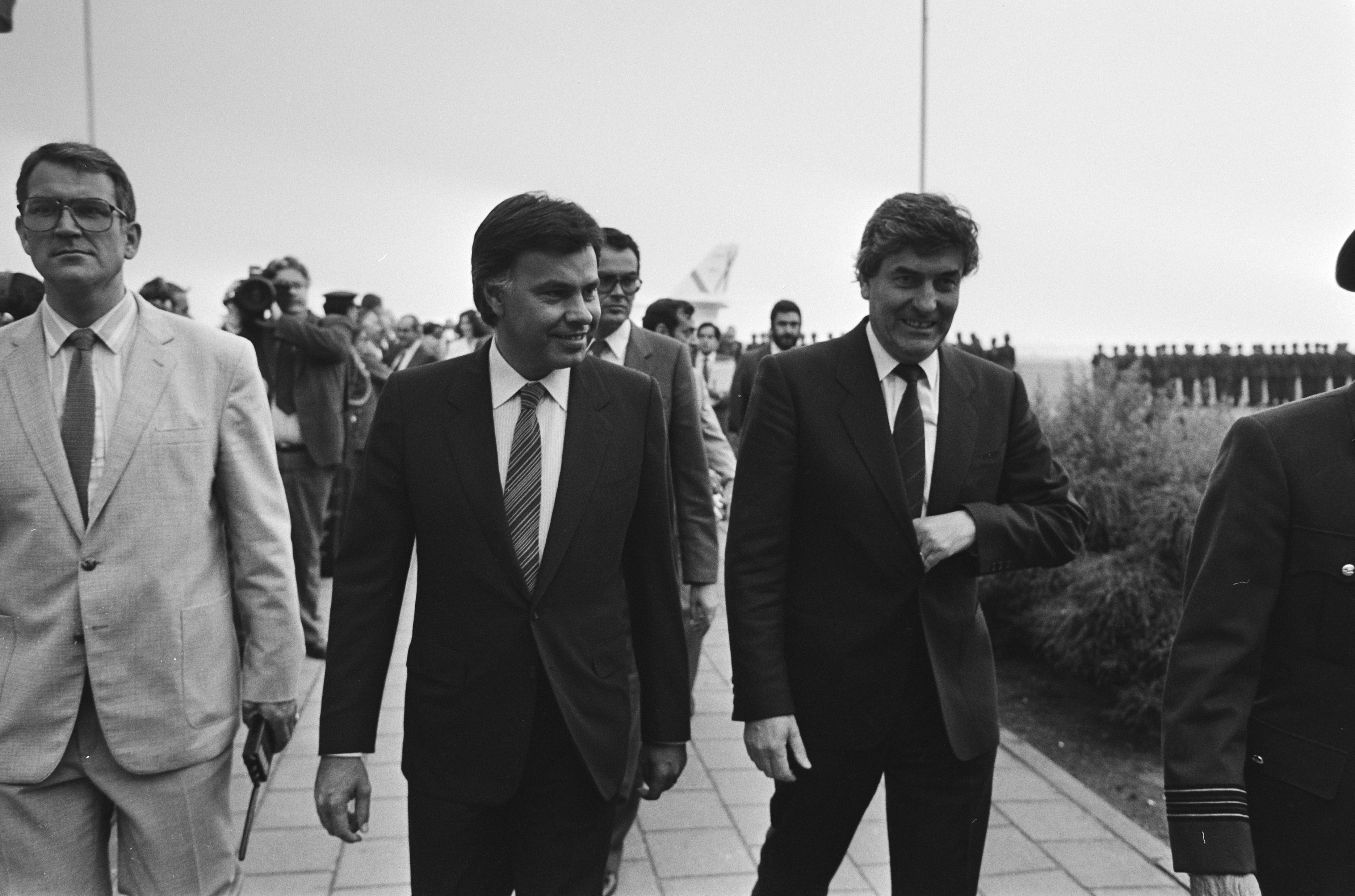 Collectie / Archief : Fotocollectie Anefo Reportage / Serie : [ onbekend ] Beschrijving : Aankomst Spaanse premier Gonzalez op Ypenburg; rechts premier Lubbers Datum : 19 juni 1985 Locatie : Den Haag, Spanje, Ypenburg, Zuid-Holland Trefwoorden : aankomsten, premiers Persoonsnaam : Lubbers, Ruud, Premier Gonzalez Fotograaf : Croes, Rob C. / Anefo Auteursrechthebbende : Nationaal Archief Materiaalsoort : Negatief (zwart/wit) Nummer archiefinventaris : bekijk toegang 2.24.01.05 Bestanddeelnummer : 933-3593